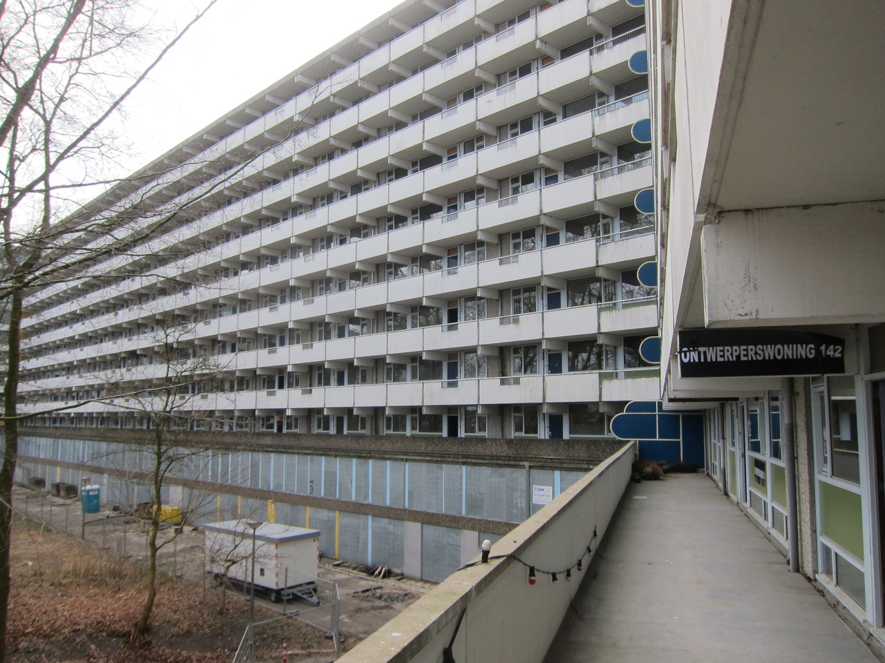 De flat Kleiburg in Amsterdam Zuidoost (2012)